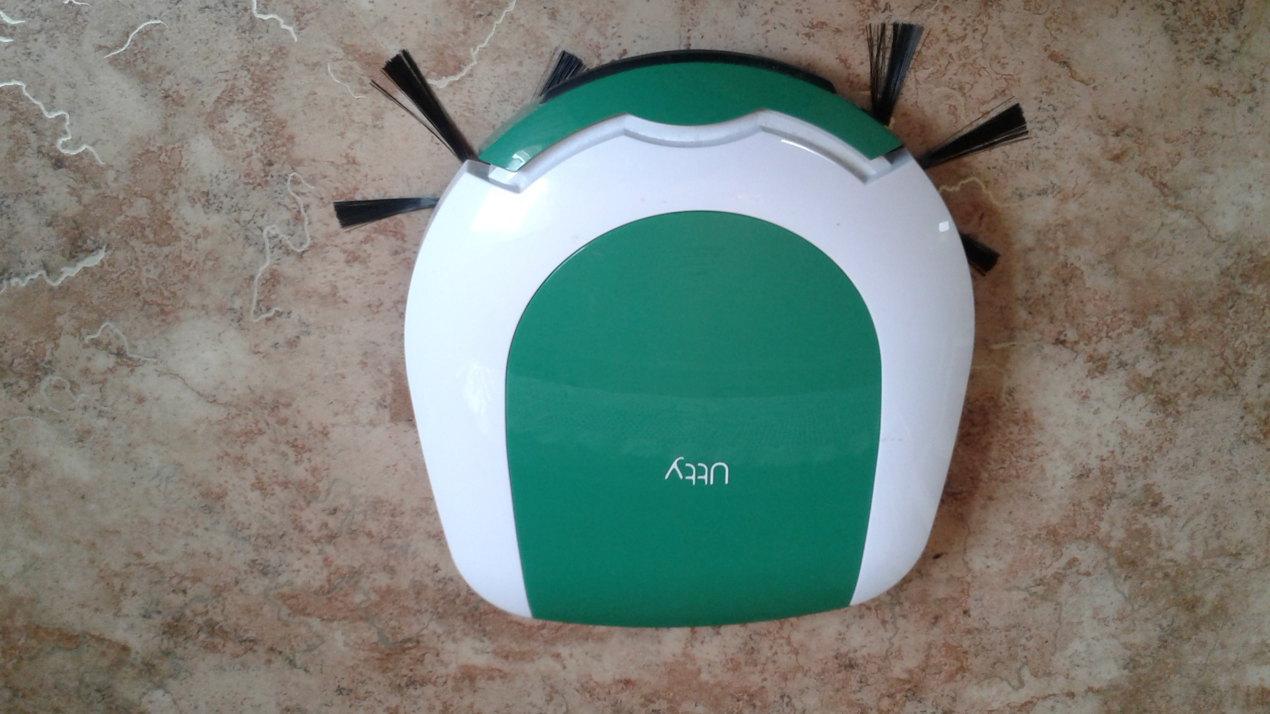 Знято мобілкою Самсунг J2